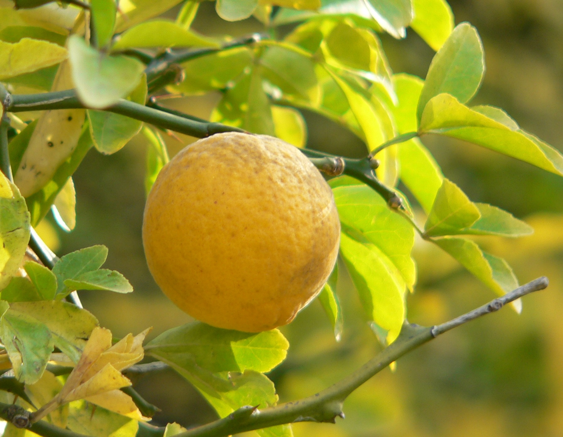 Poncirus trifoliatus